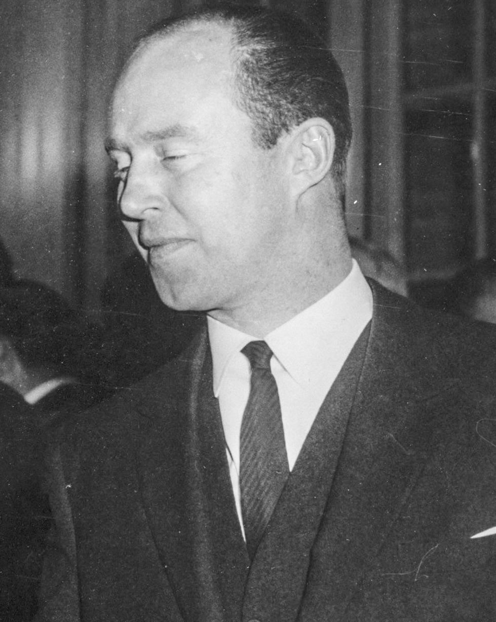 Natierlech net de Jan, mä de Charel.